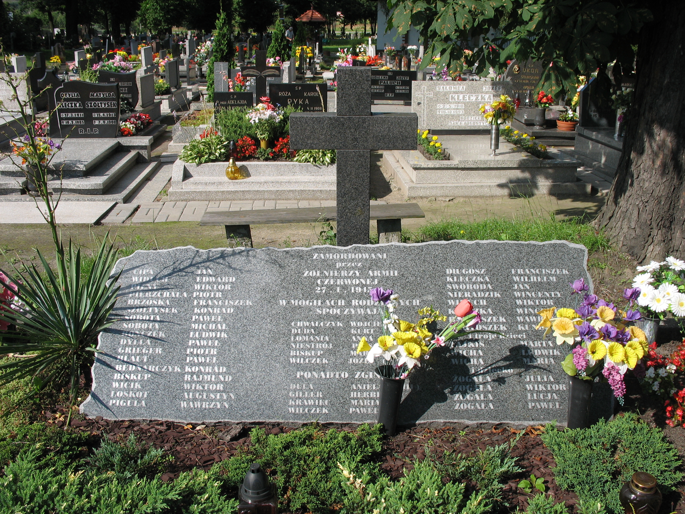 Odsłonięta 27.01.2005 roku tablica upamiętniająca mieszkańców Przyszowic, ofiary sowieckiejzbrodni w Przyszowicach